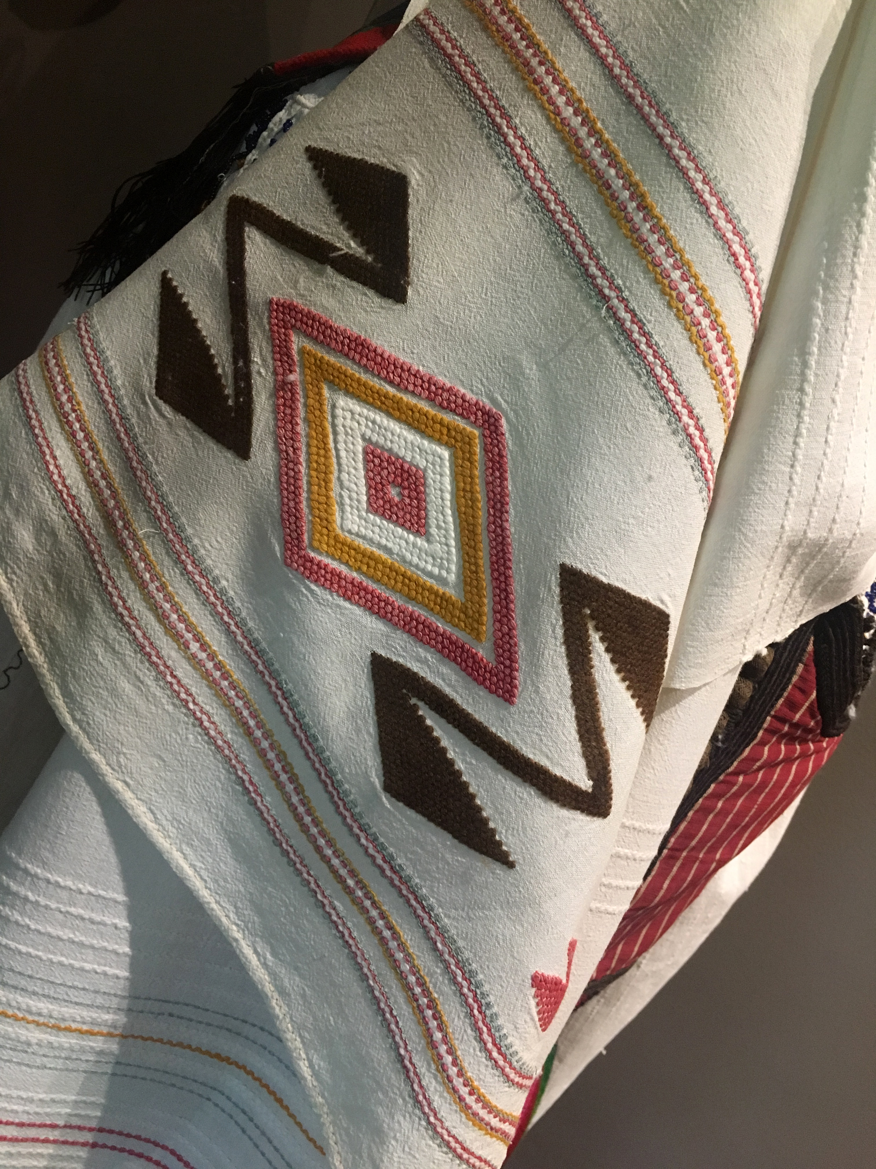 Vez na marami ženske narodne nošnje izložene u Narodnom muzeju Kruševac.